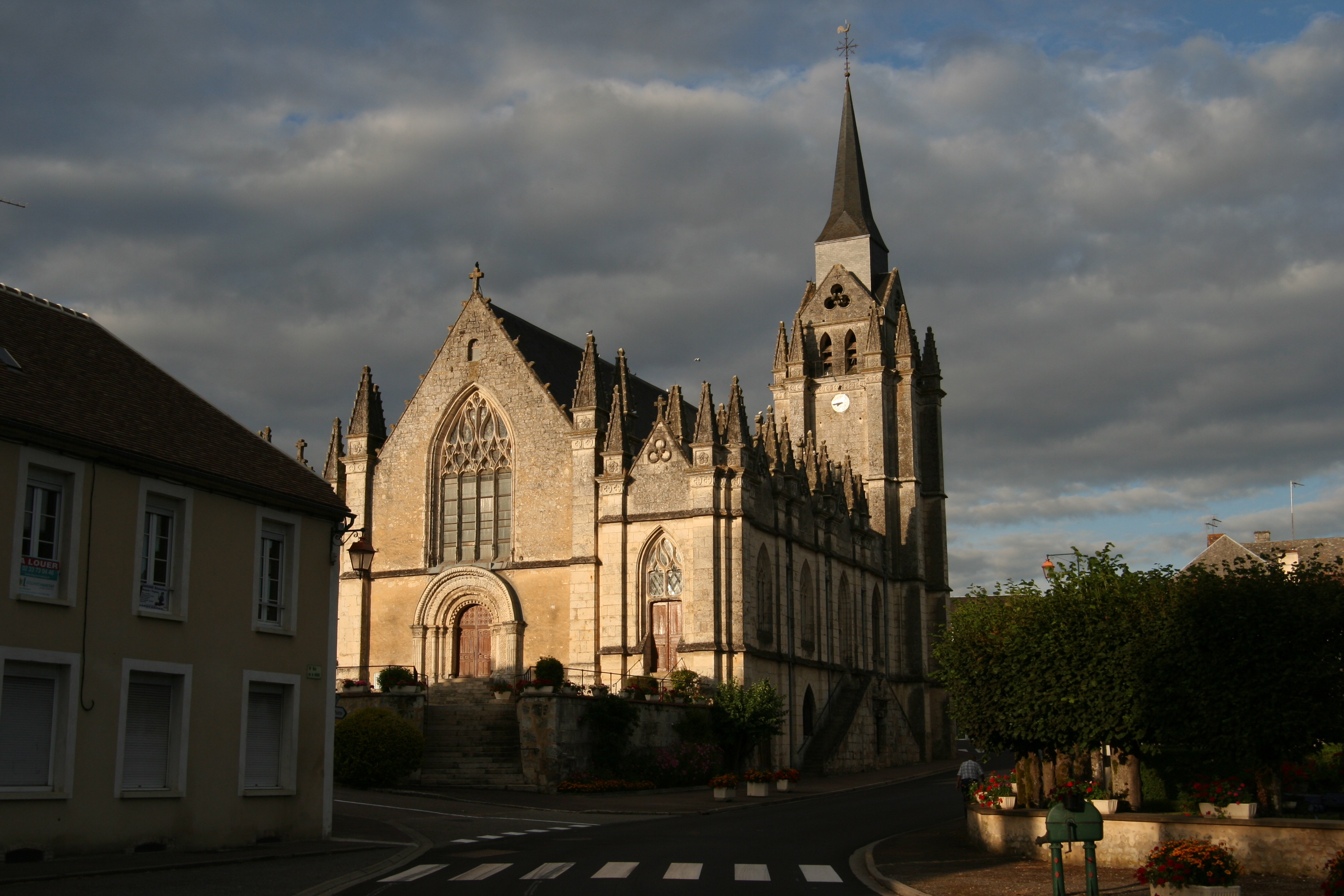 L'église Saint-Barthélémy du Pin-la-Garenne.